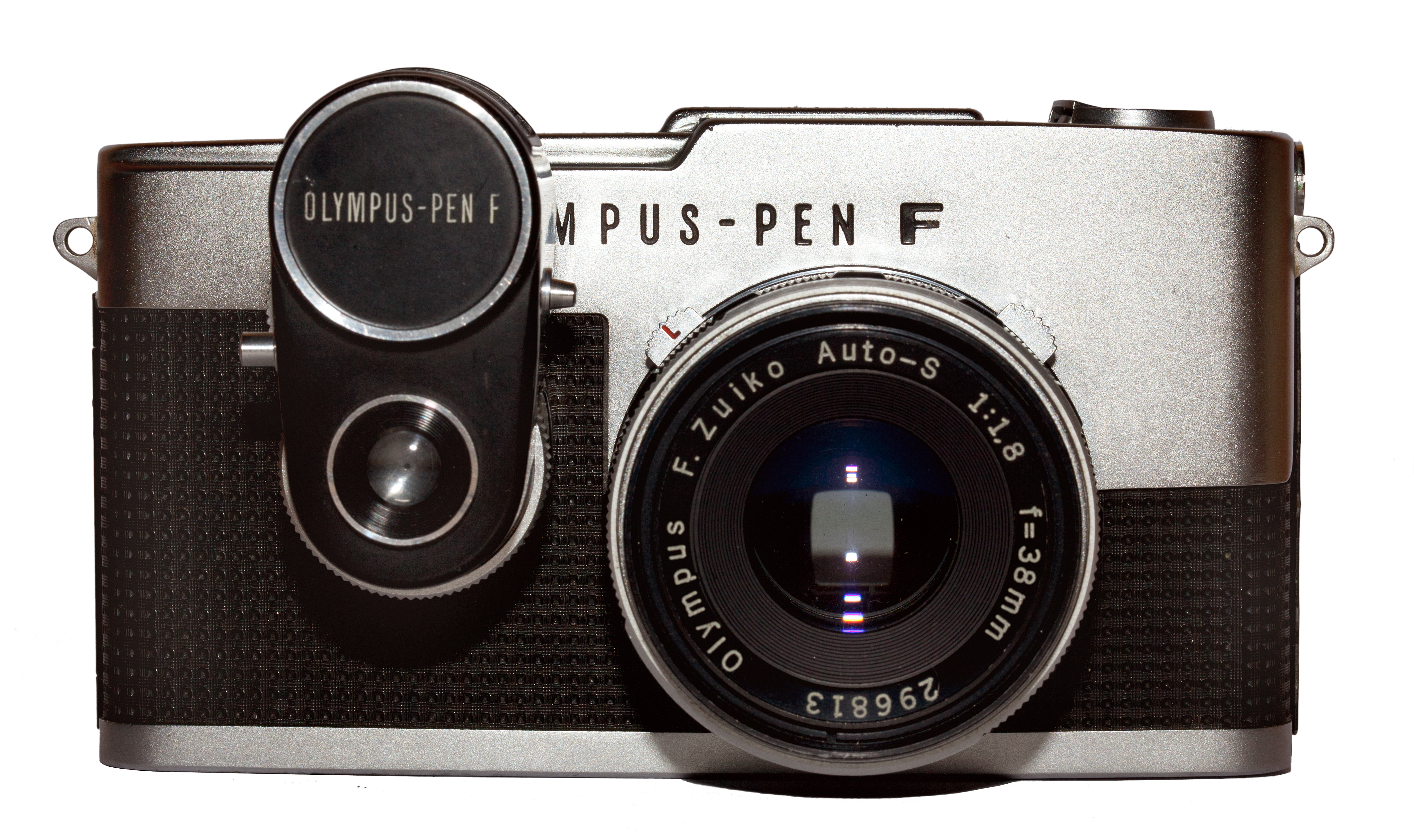 Olympus Pen F mit 1.8/38mm Objektiv und externem Belichtungsmesser